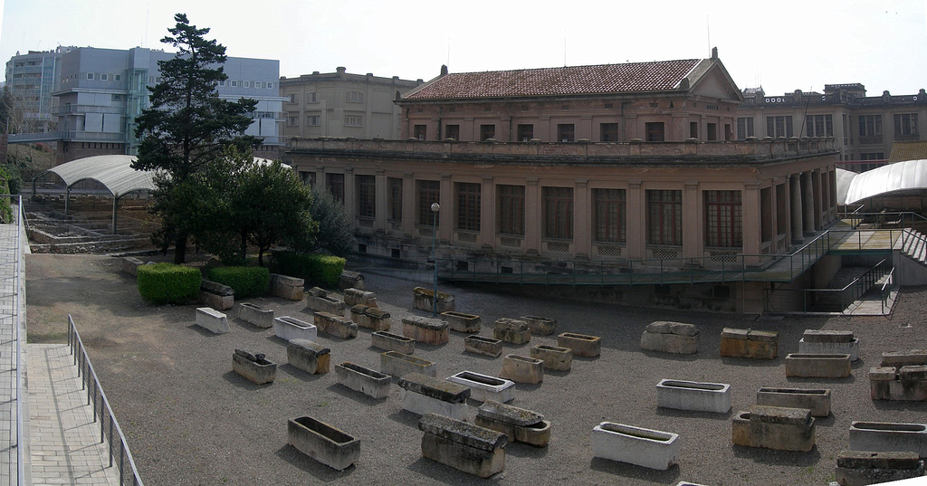 el necropoli paleochristian en la Tarragonna